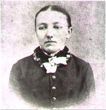 Mary Ingalls